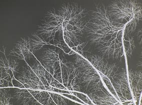 ramification fractale d'un arbre ; Guyane française